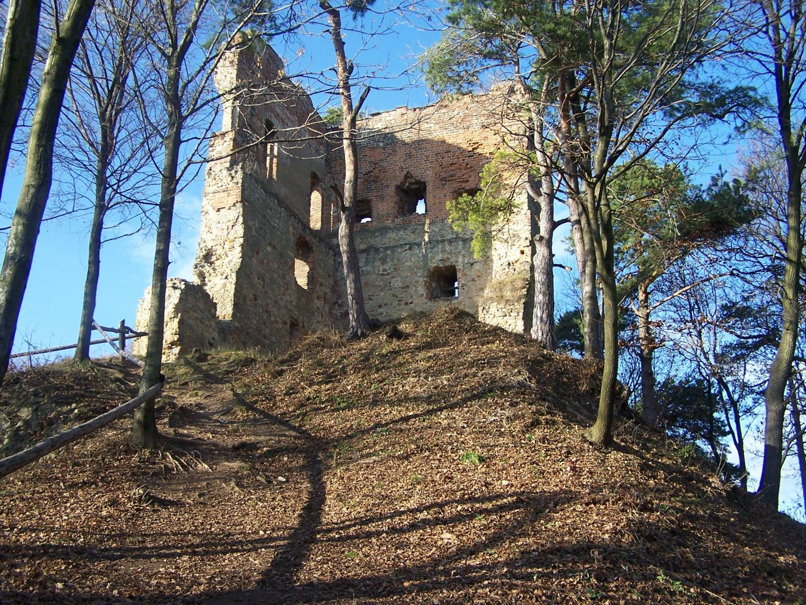 Melsztyn, ruiny zamku